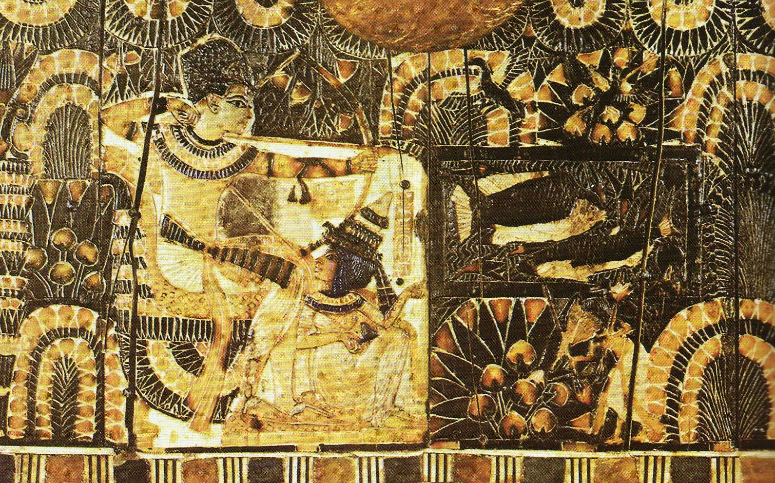 Malerei auf der Wand einer hölzernen Elfenbeintrue aus dem Grab des Tut-ench-Amun